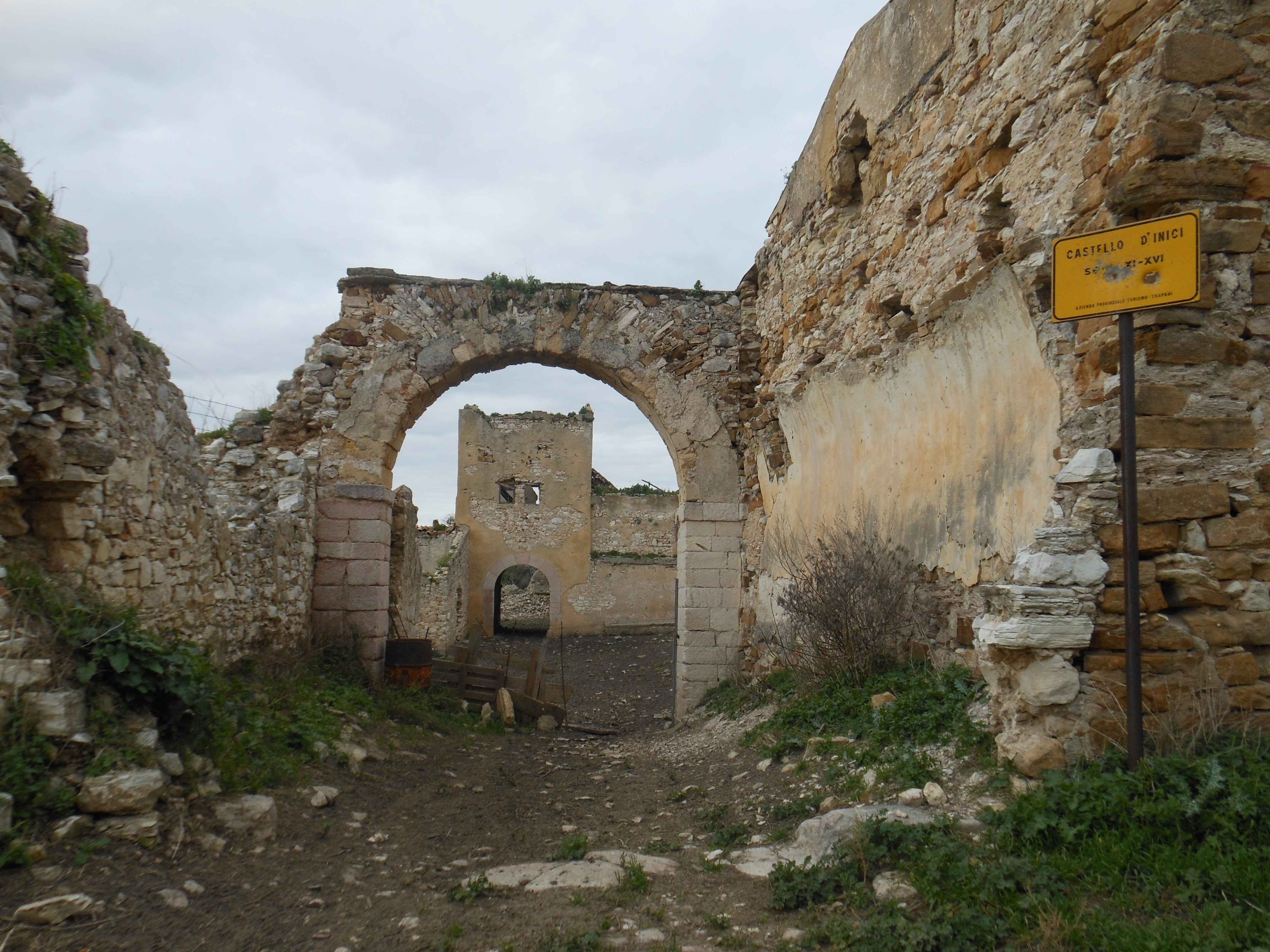 Ingresso del castello di Inici: in fondo è visibile la torre del XVI secolo